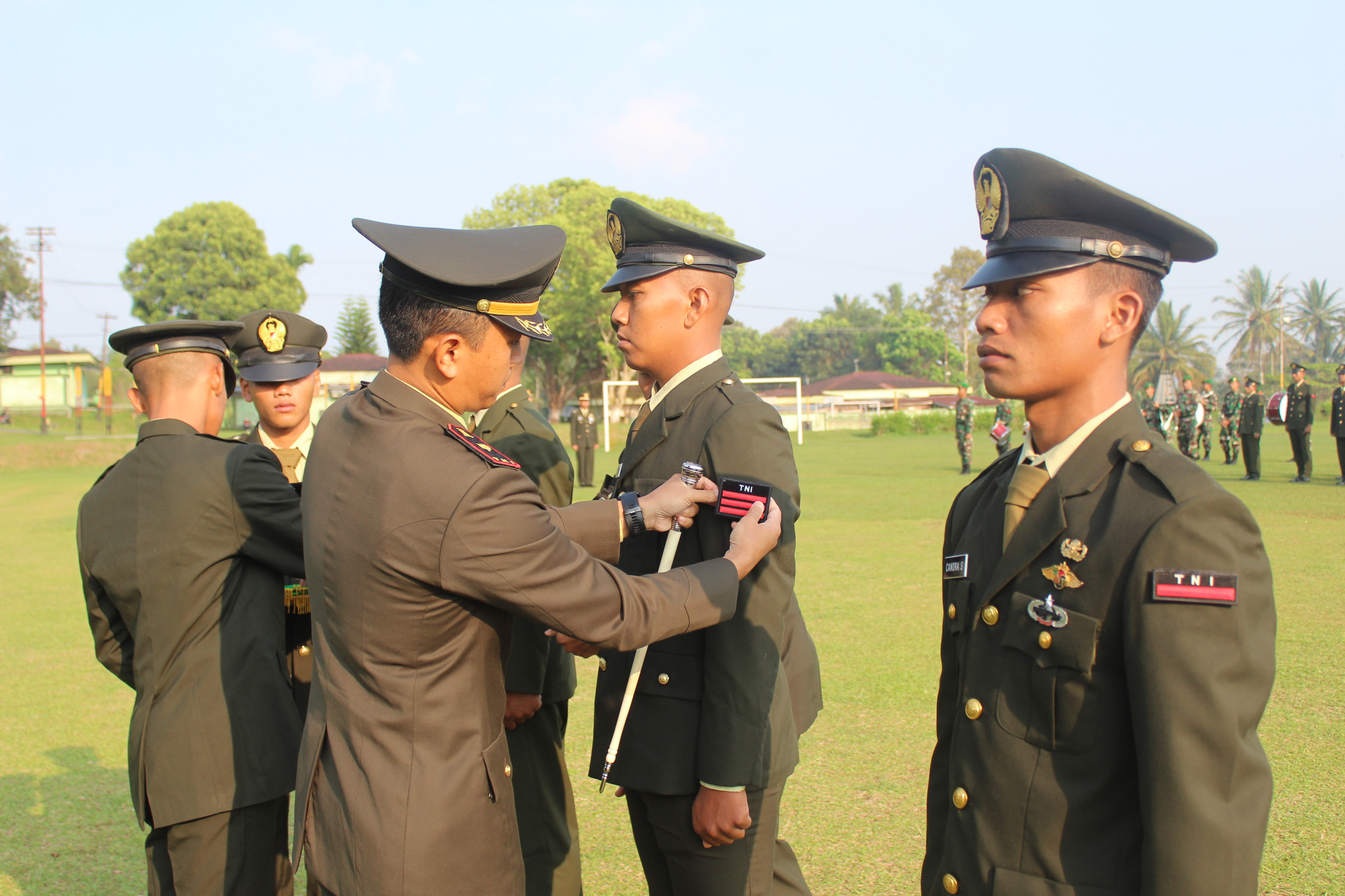 ACARA KENAIKAN PANGKAT